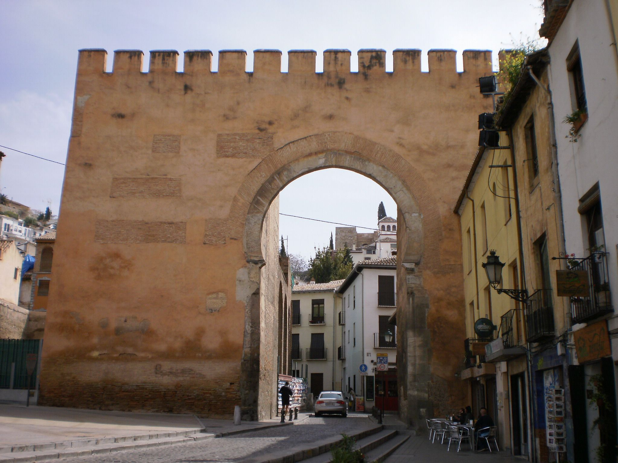 Puerta de Elvira, Granada